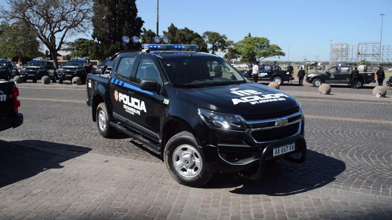 Chevrolet S10 de la policía santafesina